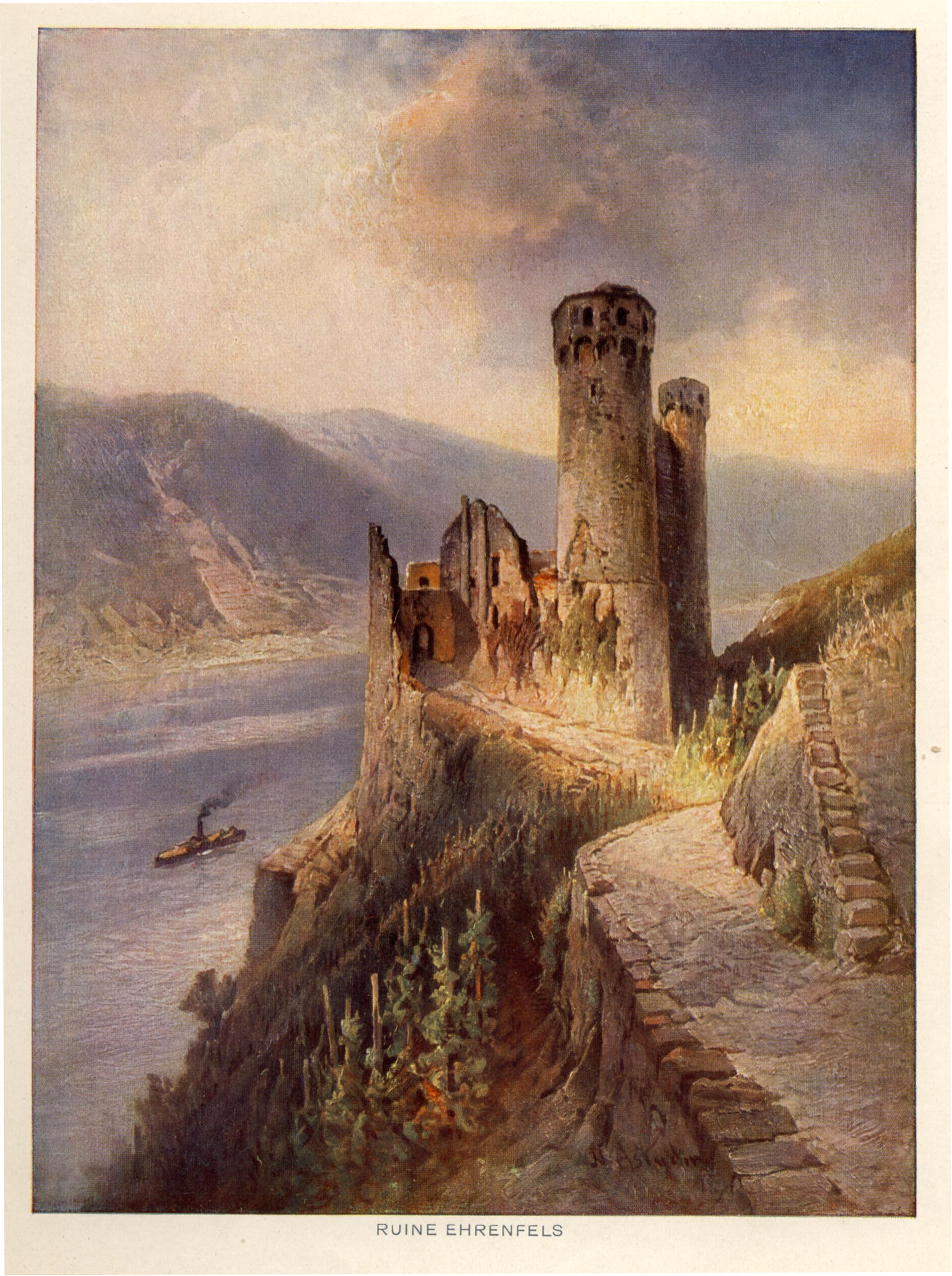 Die Ruine Ehrenfels bei Rüdesheim